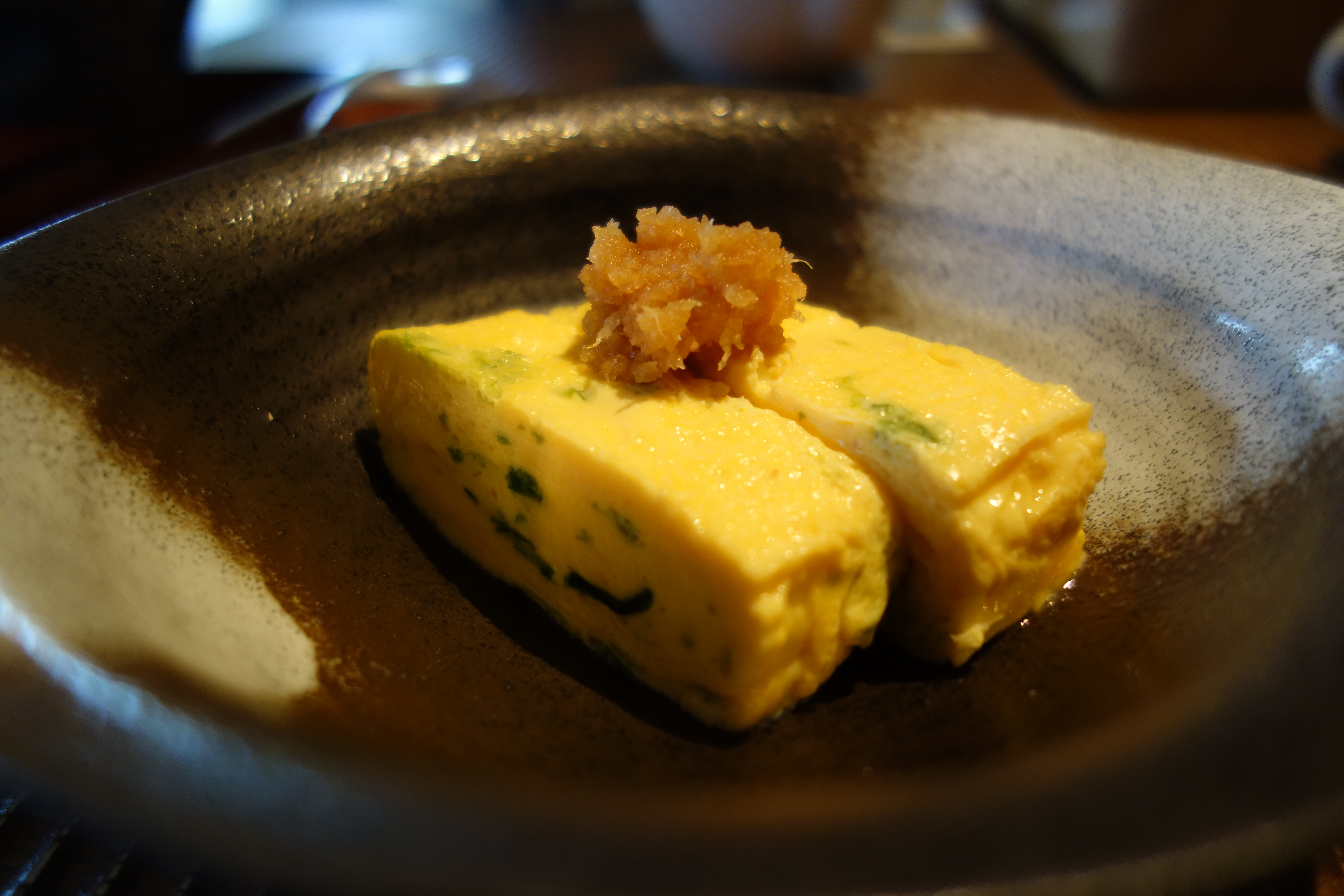 卵焼き （ほうれん草入り、大根おろし添え）